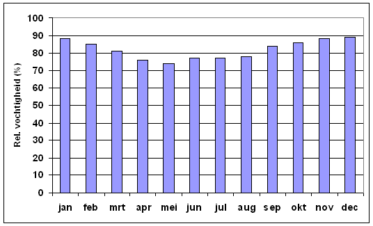 data: KNMI Langjarige gemiddelden (1971-200) .